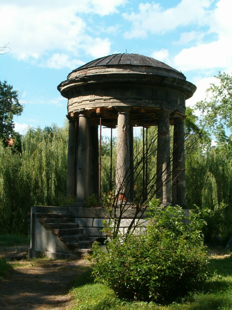 Dobrzyca, ul. Pleszewska 5A - zespół pałacowy: monopter z końca XVIII w. (zabytek nr 4/A)